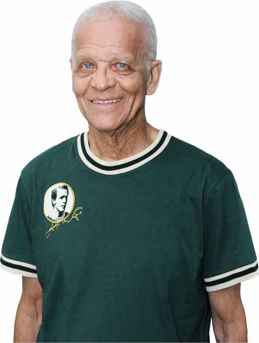 Ademir da Guia ex-jogador da Sociedade Esportiva Palmeiras